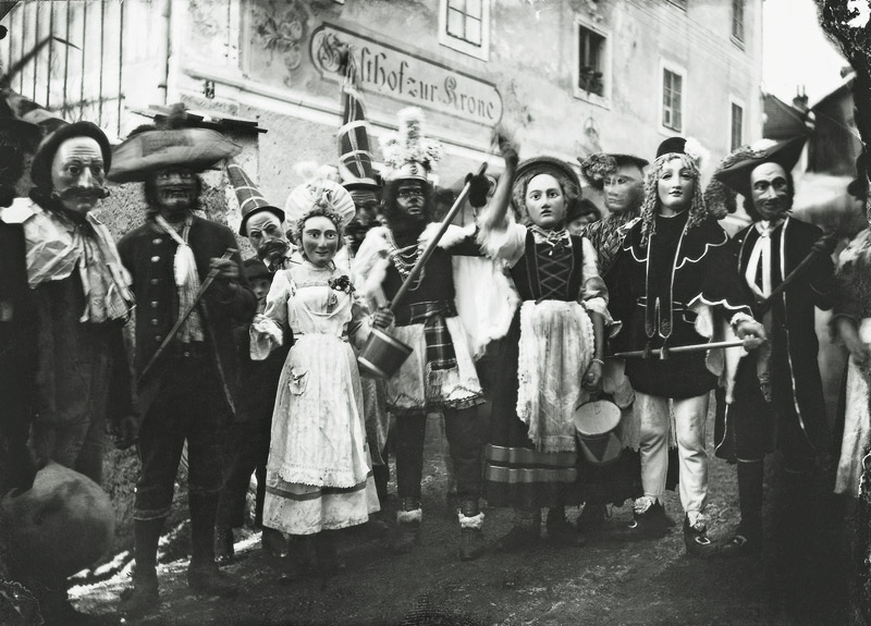 Imster Schemenlaufen